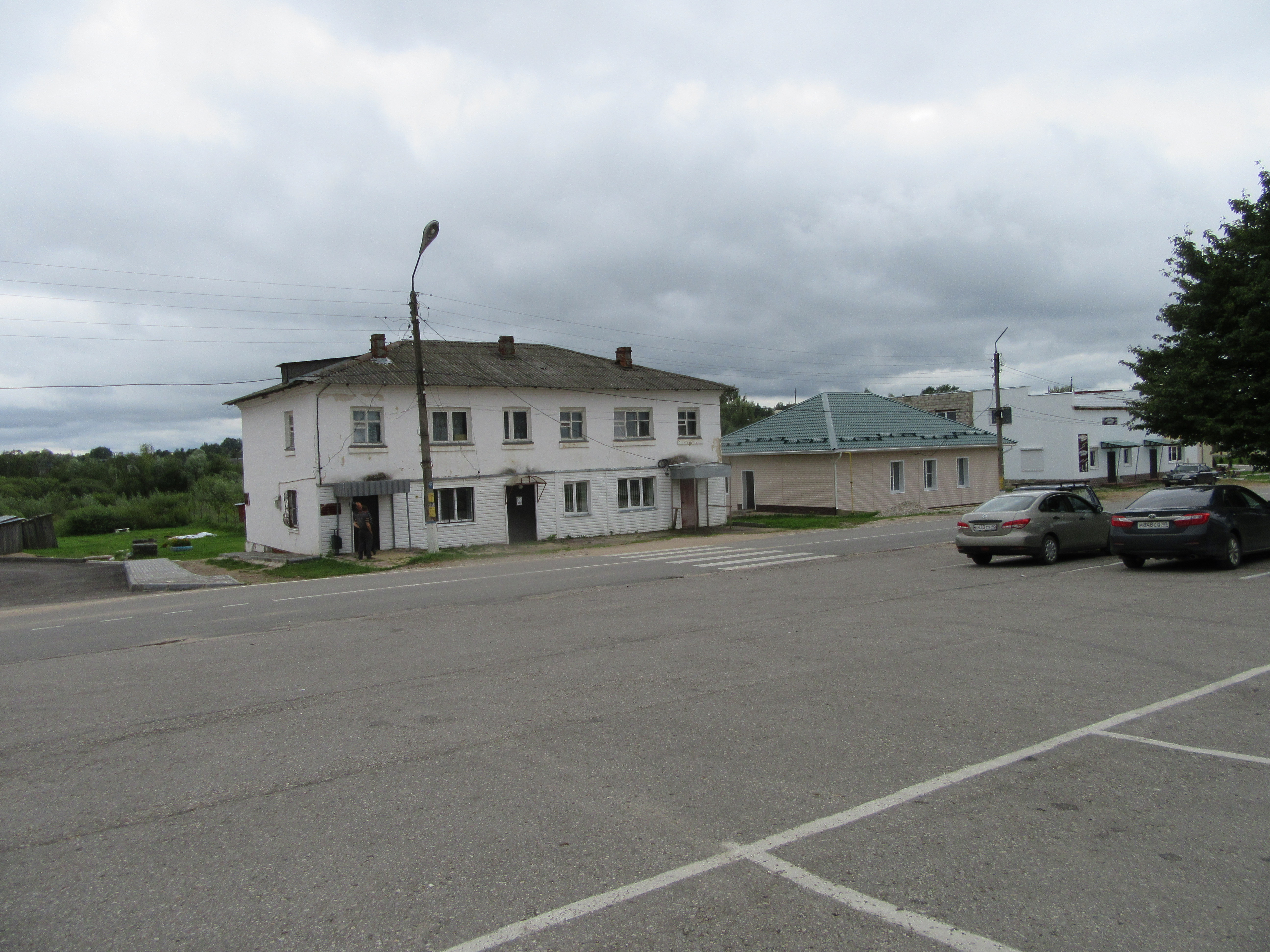 Износки, центр села, здание БТИ